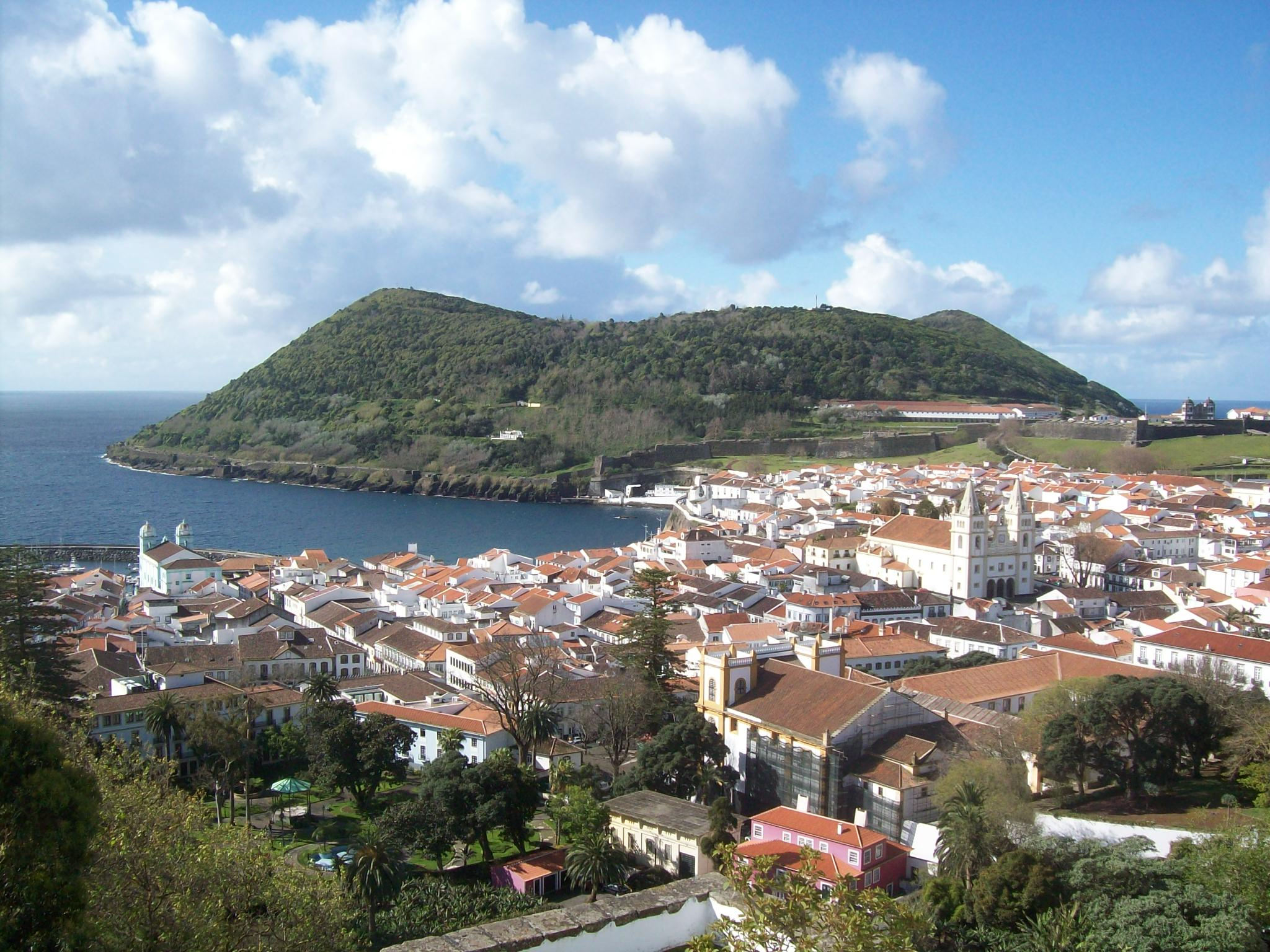 Vista geral de Angra do Heroísmo